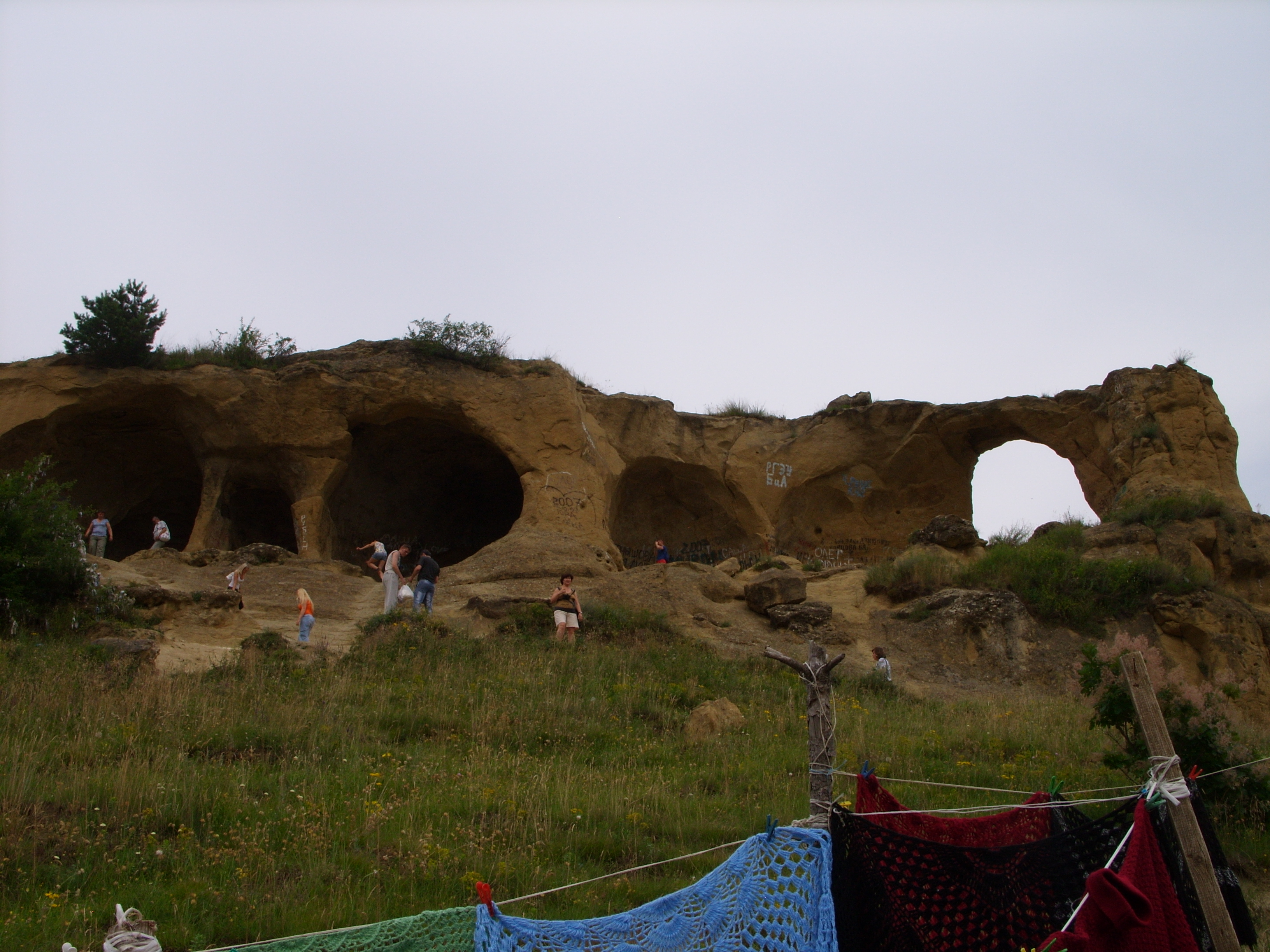 вблизи г. Кисловодска